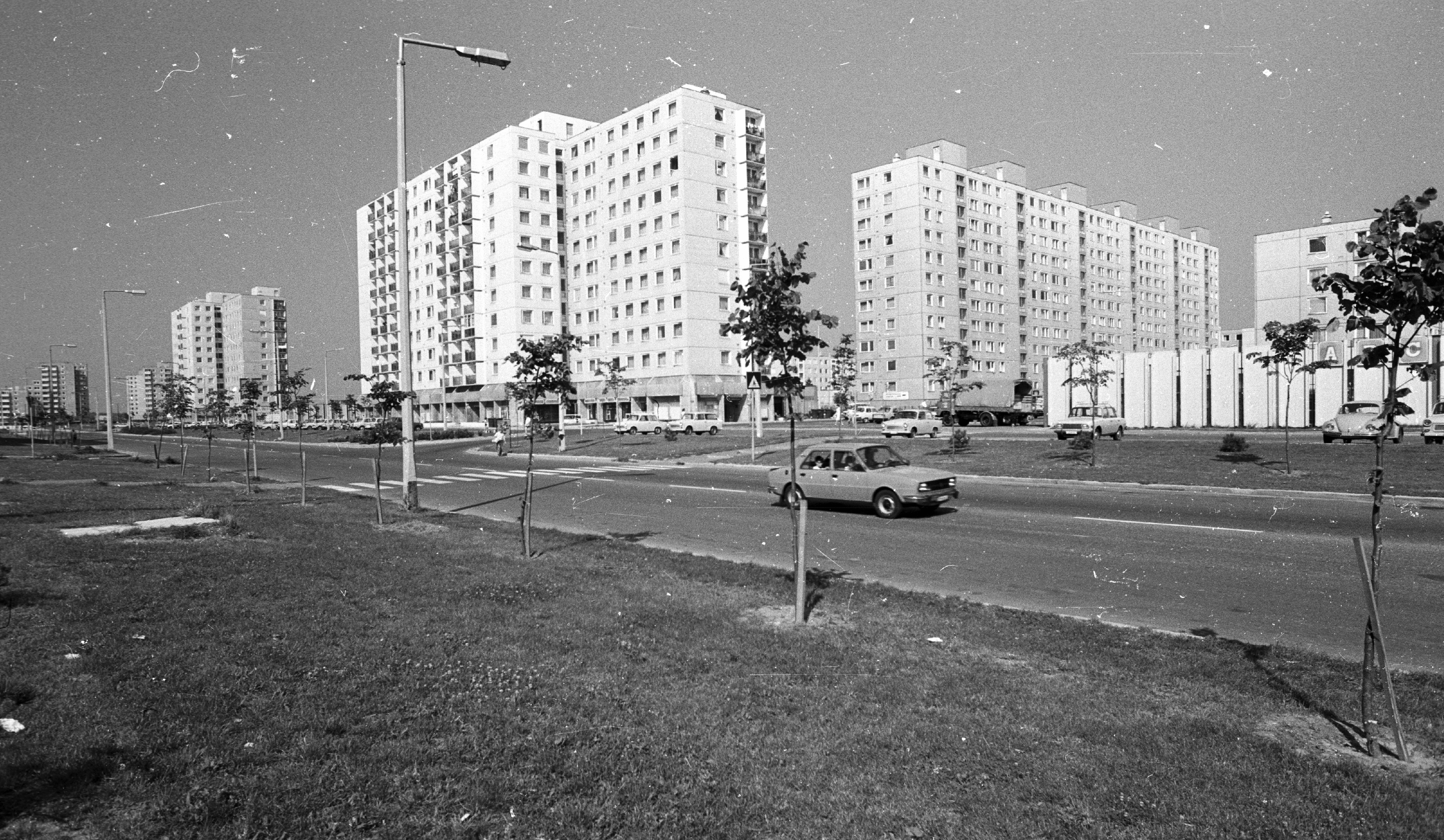 Marcalváros (Kun Béla lakótelep), Lajta út a Répce (Heszky Ezsébet) utca felé nézve. Location: Hungary, Győr Title: Marcalváros (Kun Béla lakótelep), Lajta út a Répce (Heszky Ezsébet) utca felé nézve.